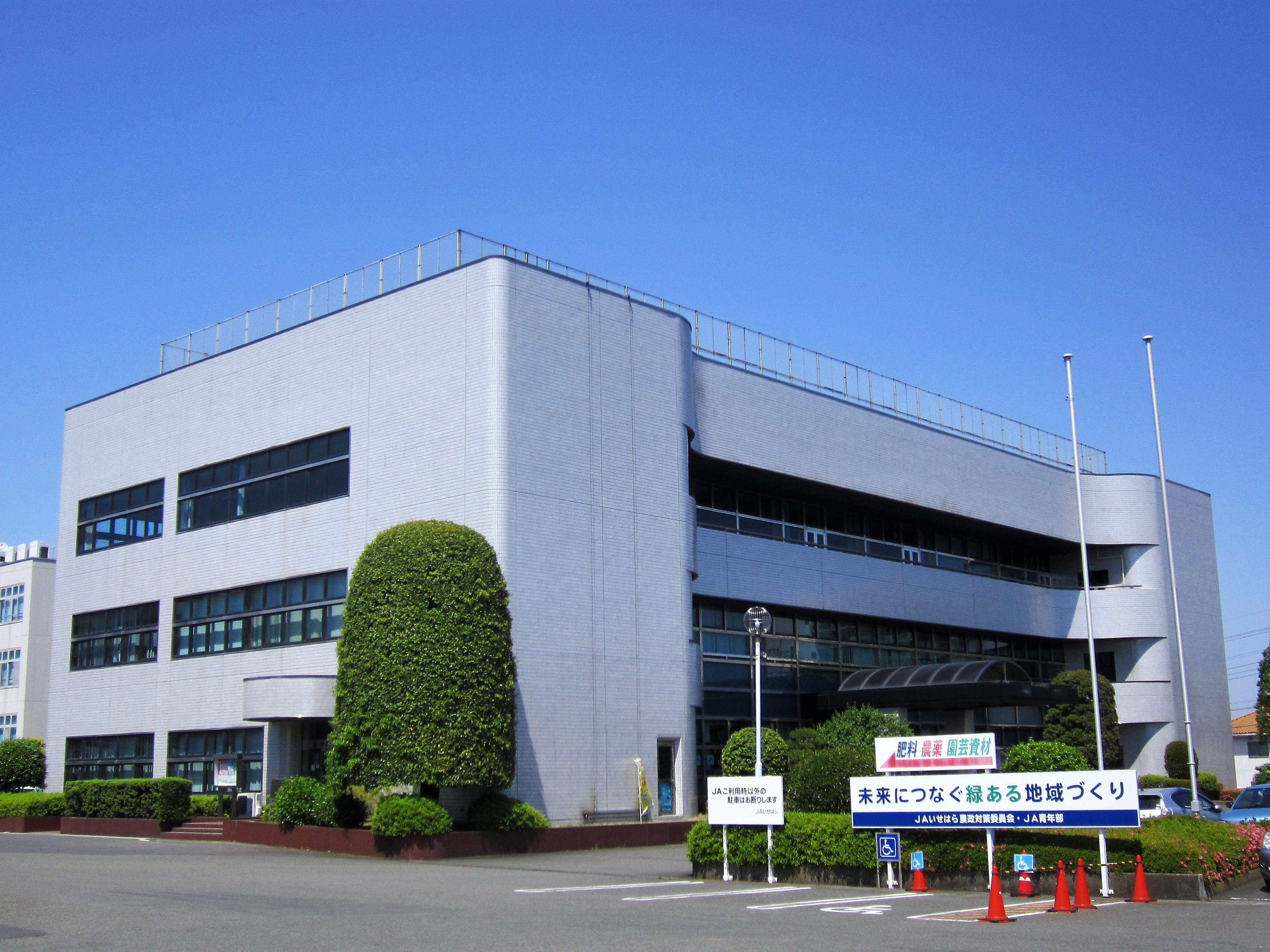 伊勢原市農業協同組合 本所・伊勢原支所（伊勢原市田中） Canon PowerShot A2200